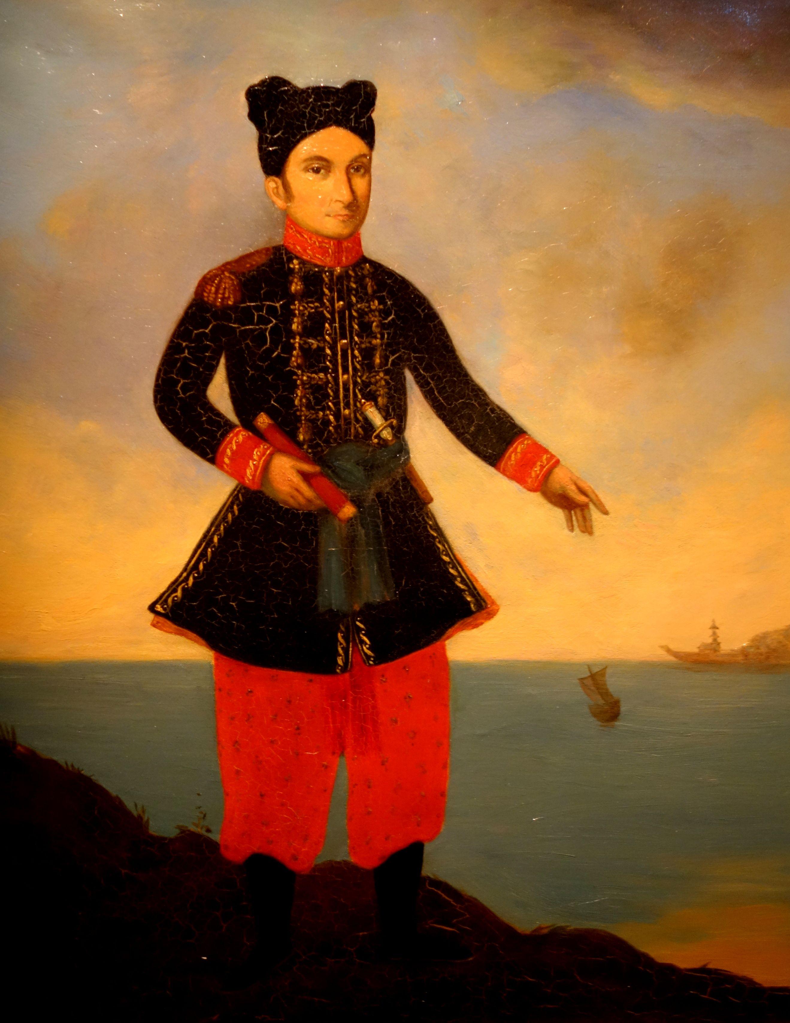 Chân dung Thắng toàn hầu Nguyễn Văn Thắng/ J.B. Chaigneau trong bộ quân phục sĩ quan chúa Nguyễn khỏang năm 1805